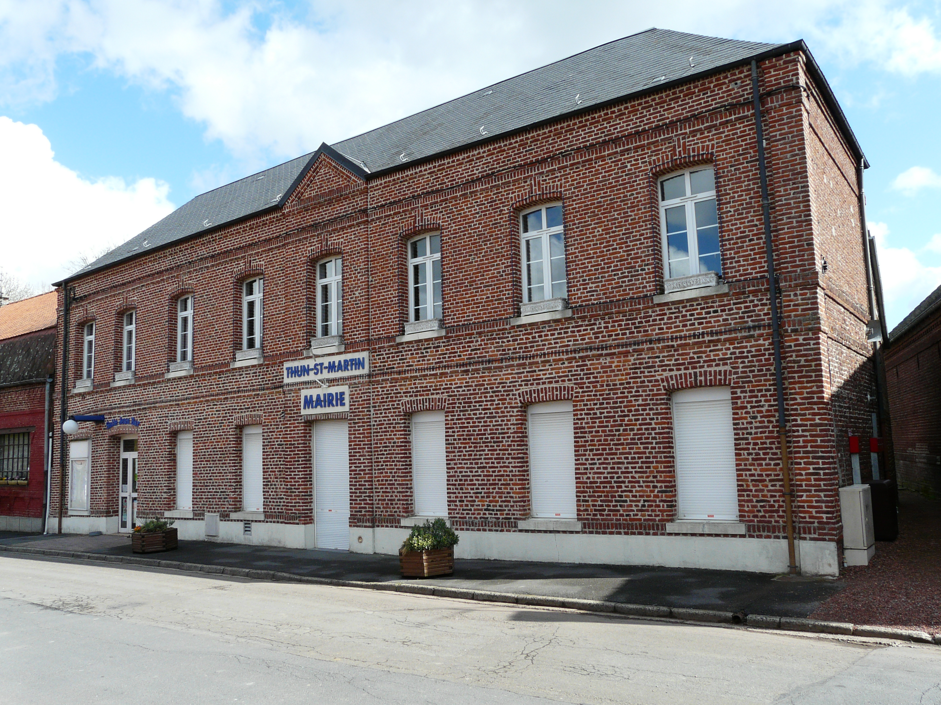 La mairie de Thun-Saint-Martin (Nord)